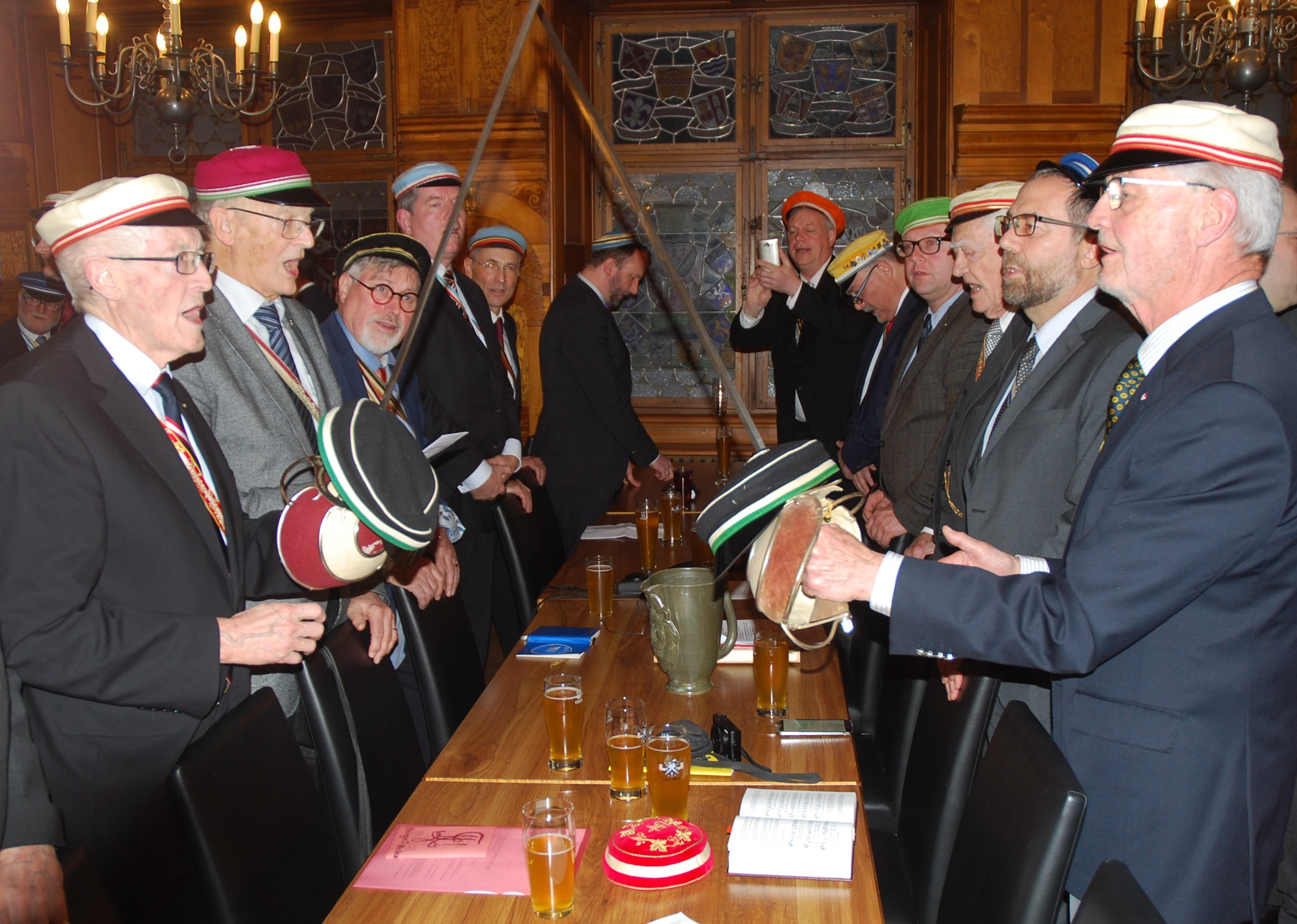 Landesvater (Brauch) in Basel